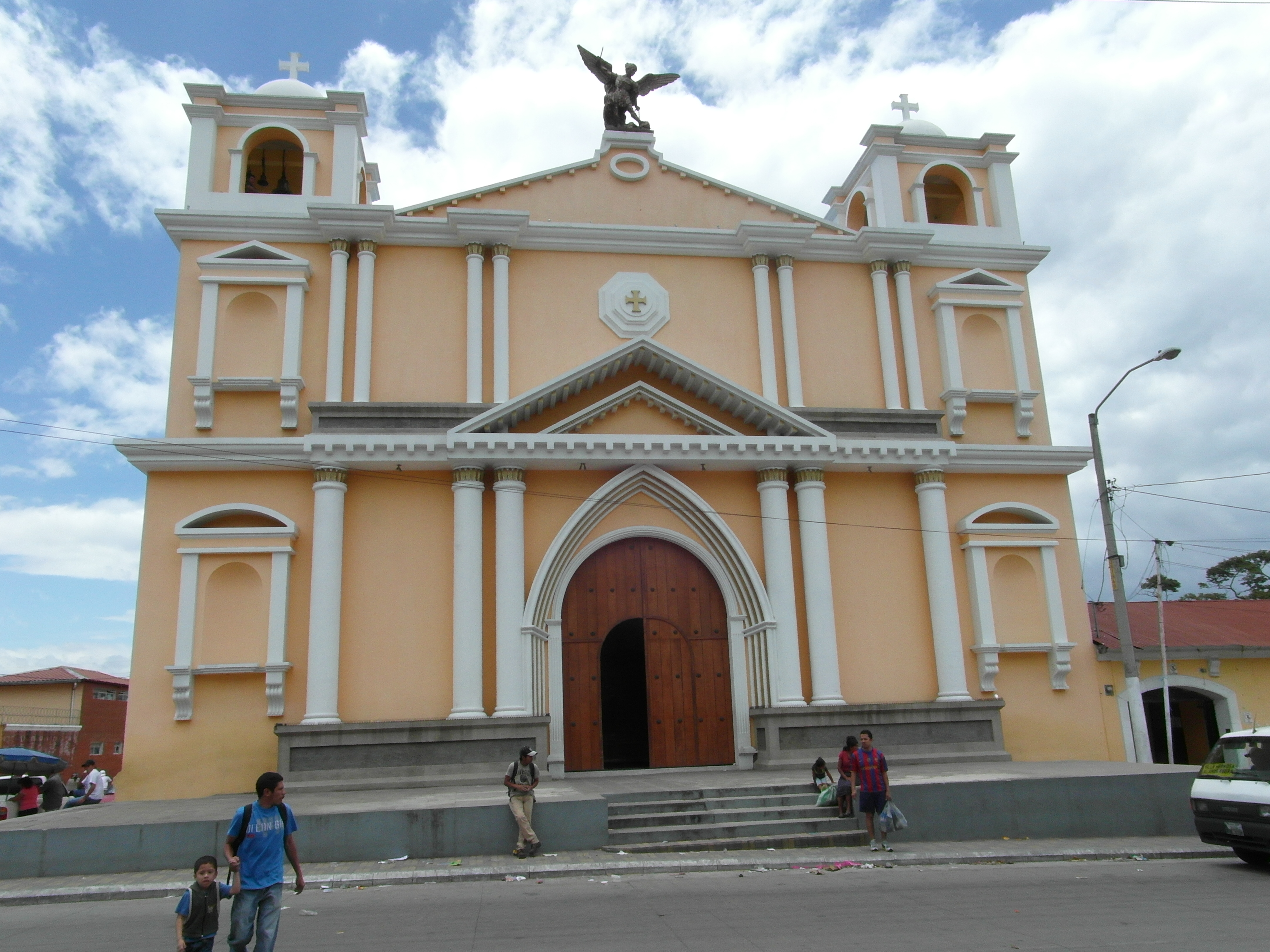 Parte frontal de la iglesia de San Miguel Petapa